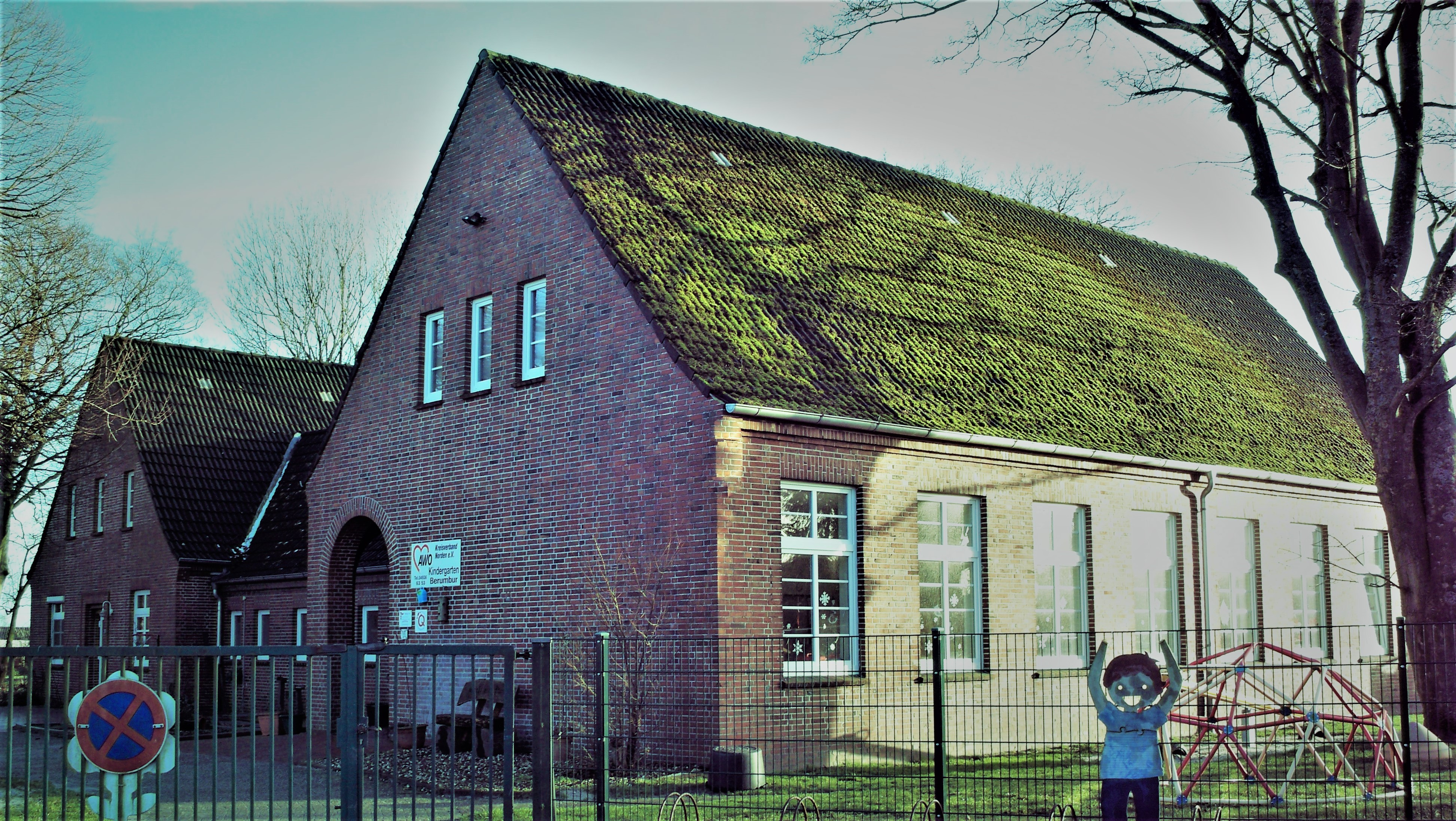 AWO-Kindergarten Berumbur-Kleinheide (Samtgemeinde Hage, Kreis Aurich, Niedersachsen, Deutschland)